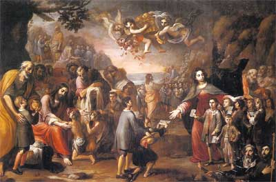 Cristo y la Virgen como protectores de la infanccia,title QS:P1476,es:"Cristo y la Virgen como protectores de la infanccia,"